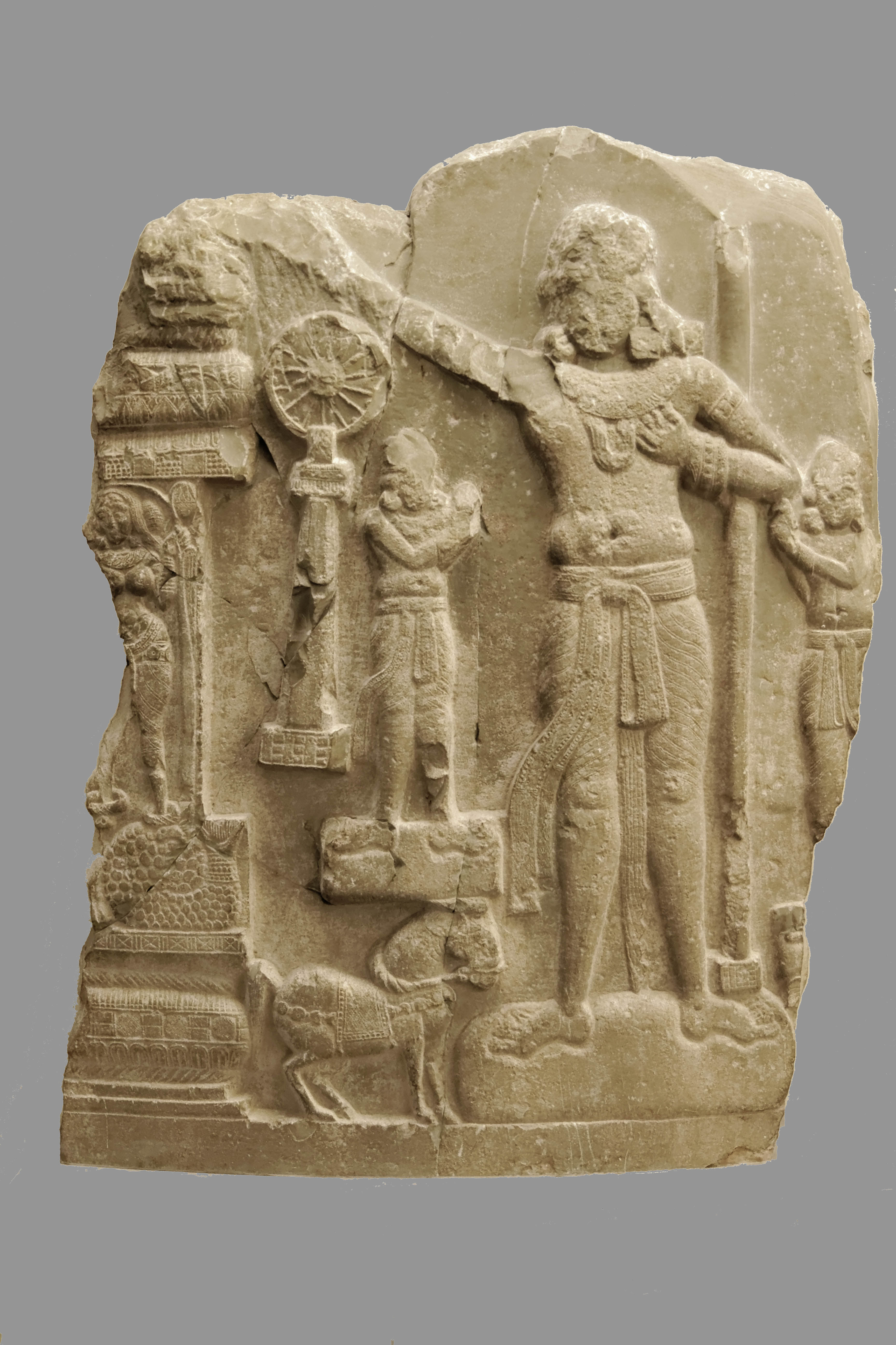 Le souverain universel ou çakravartin (peut-être une représentation du roi Ashoka)- Andhra Pradesh, Amaravati, école d'Amaravati fin du 1er siècle avant JC-1er siècle - plaque de revêtement de stupa en calcaire marmoréen - Musée Guimet